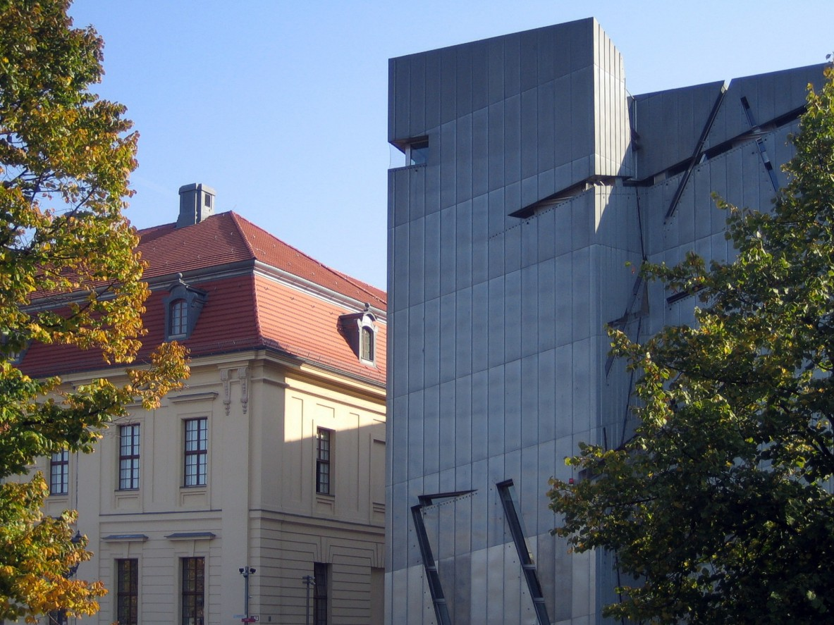 Berlin-Kreuzberg. Jüdisches Museum, Straßenfront, Teilansicht.